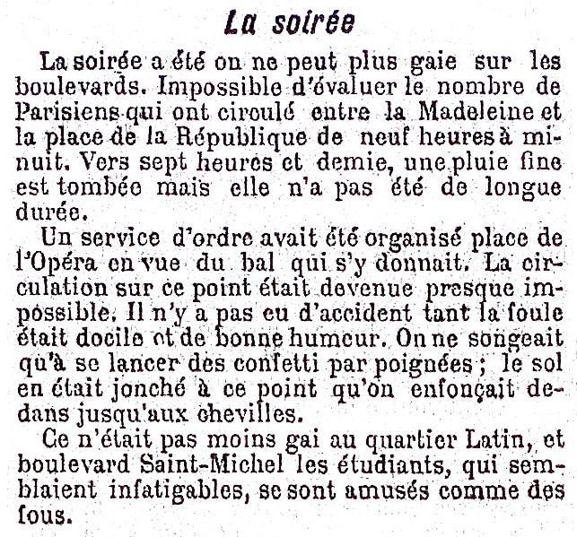 La soirée de la Mi-Carême à Paris, extrait de l'article La Mi-Carême